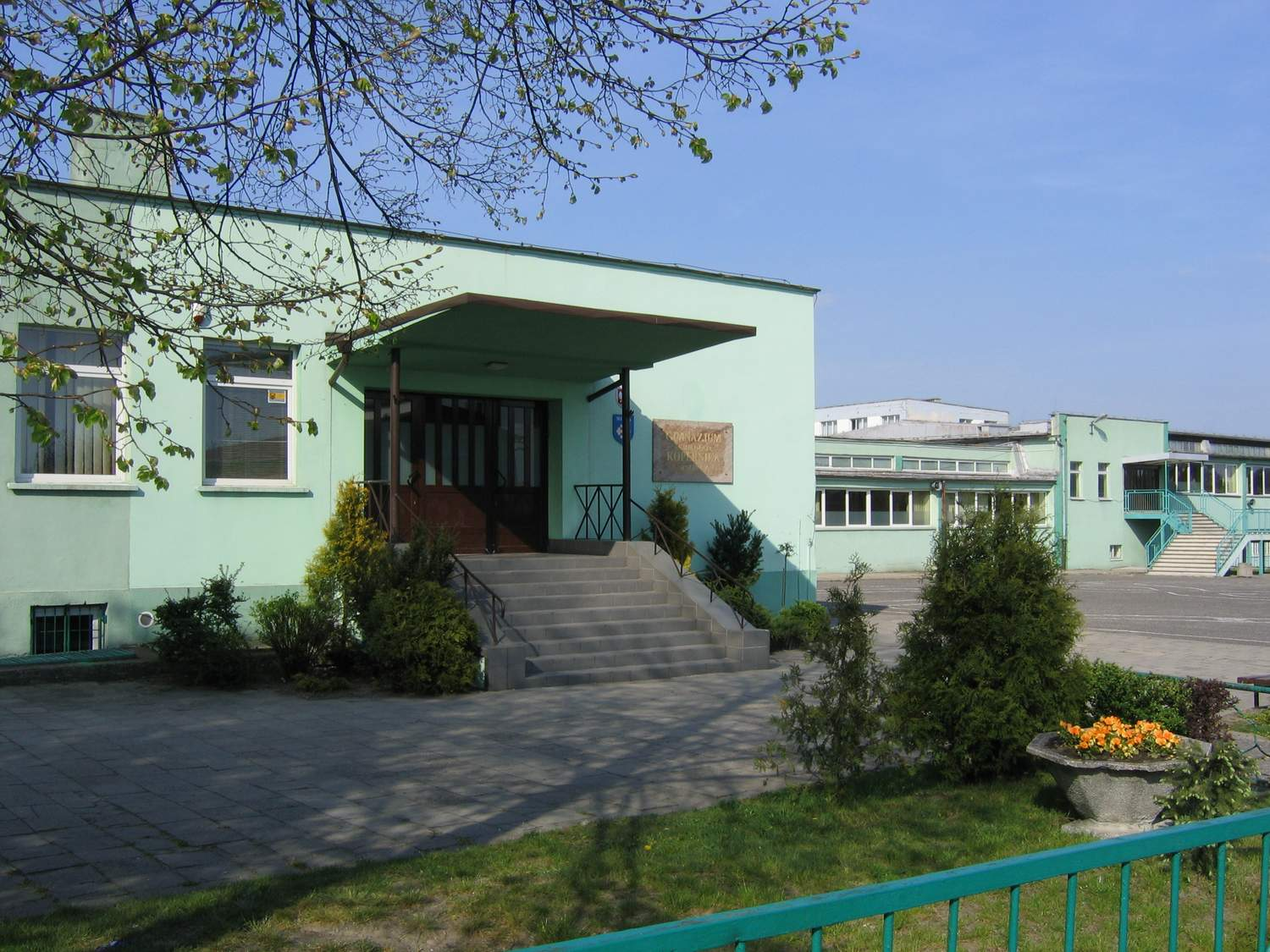 Publiczne Gimnazjum im. Mikołaja Kopernika w Słupcy. (foto. Marcin Majdecki)